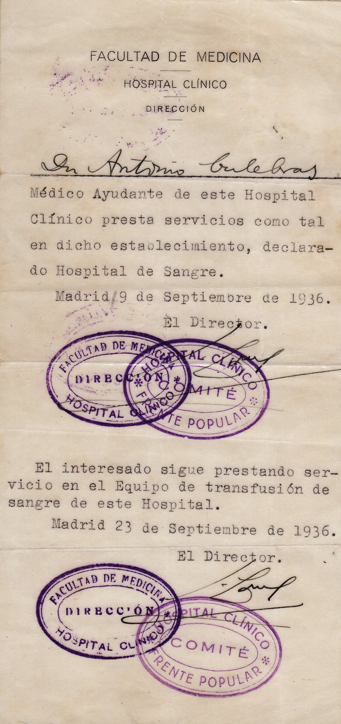 Certificado_Hospital_Sangre